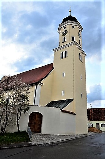 evang.-luth. Kirche St. Andreas in Kleinsorheim